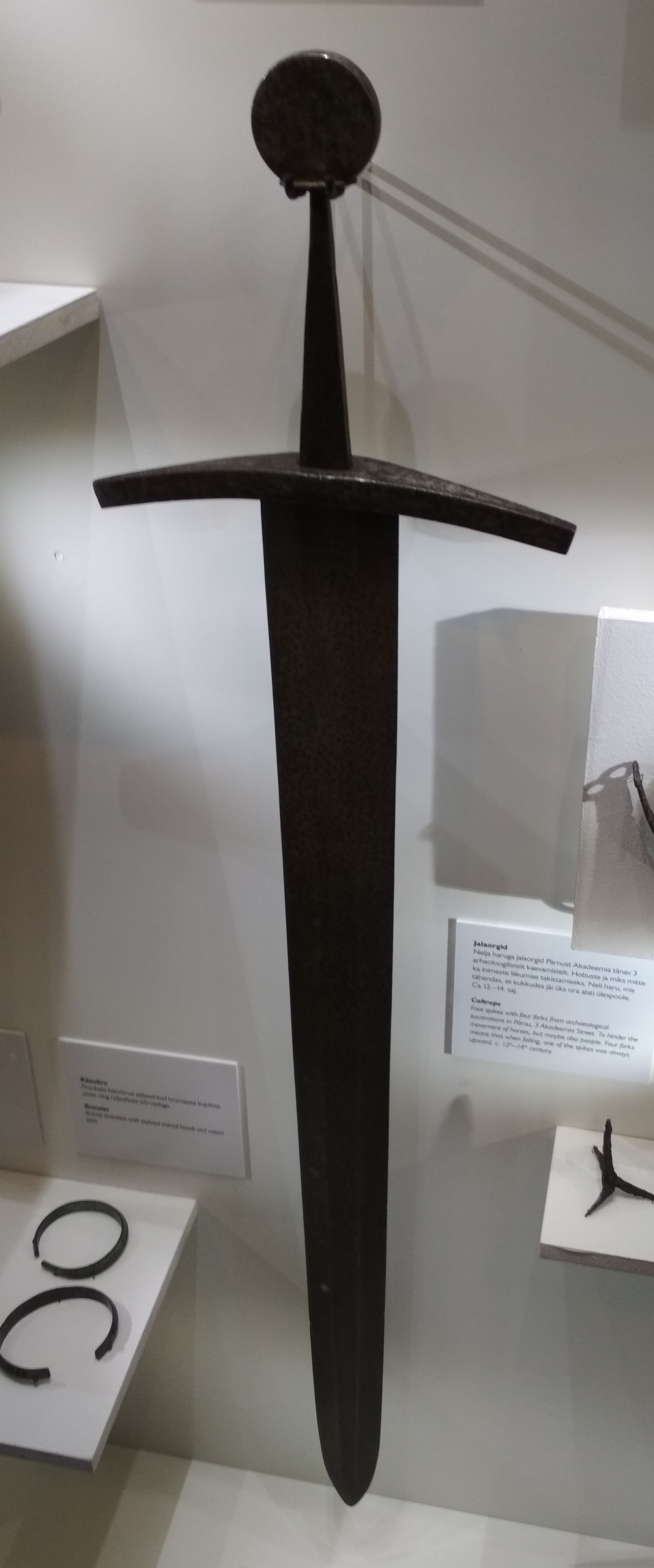 Ristisõdijate mõõga koopia Pärnu muuseumis